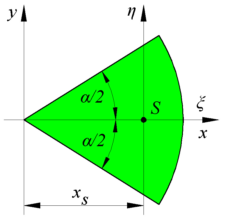 Körcikk másodrendű nyomatékához ábra